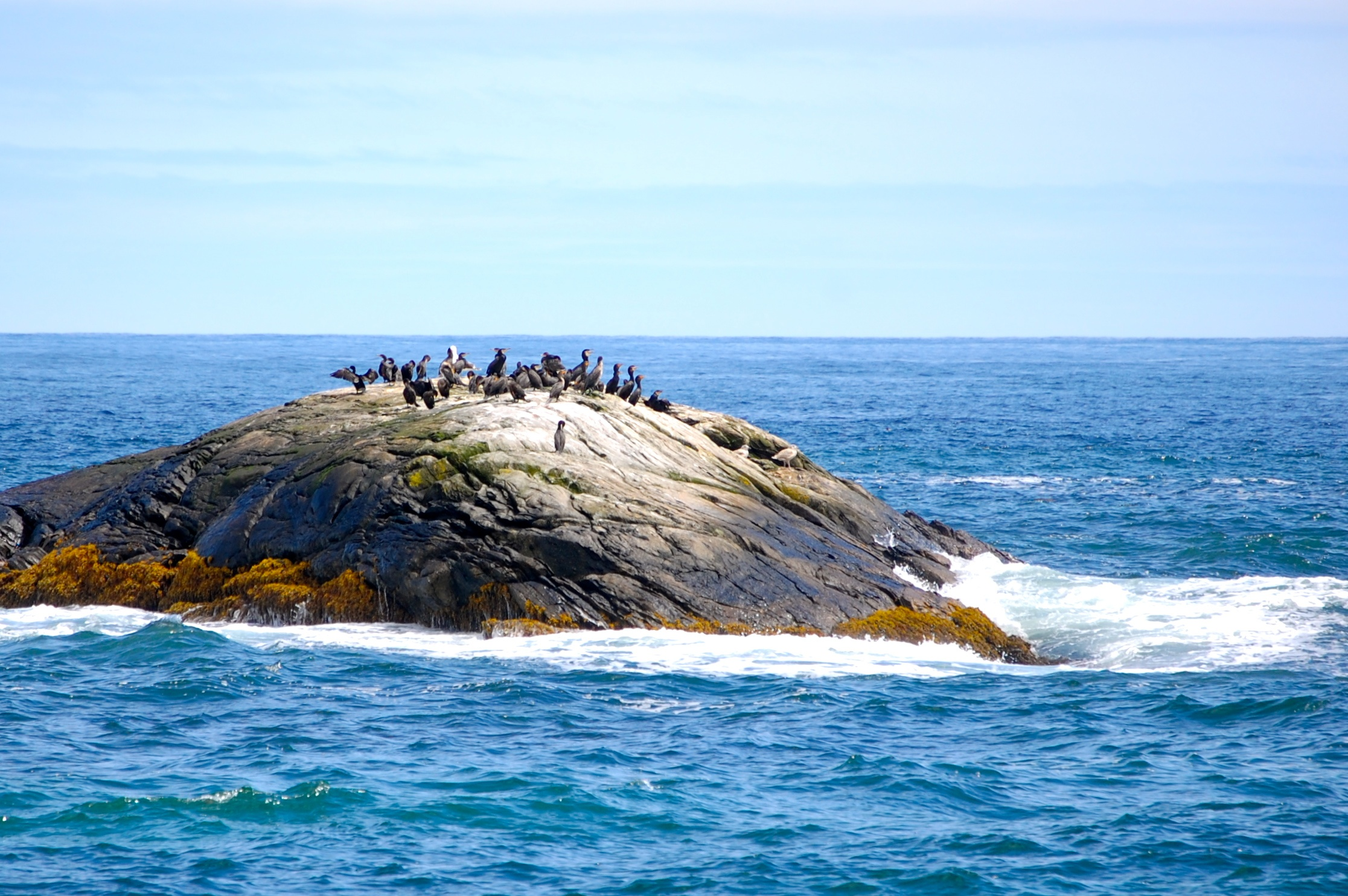 Grand cormoran (Phalacrocorax carbo) sur un rocher au large du parc national de Kejimkujik (annexe côtière)